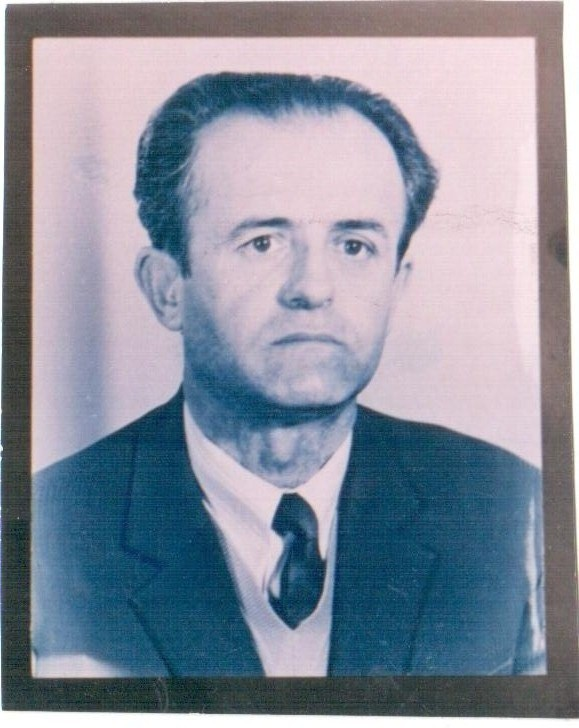 Fatmir Agalliu